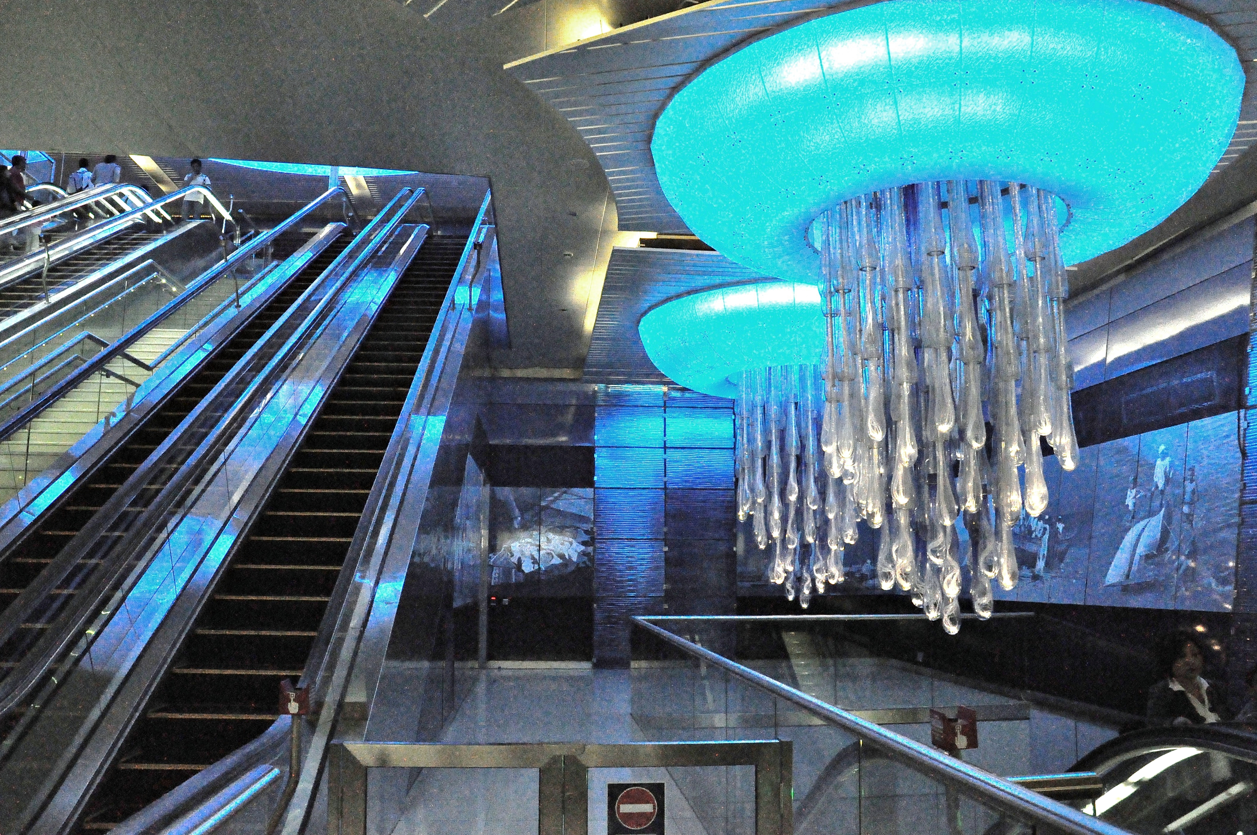 emiratos arabes